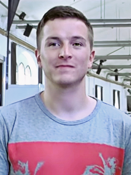 Aaron Troschke auf der Hanfmesse in Berlin